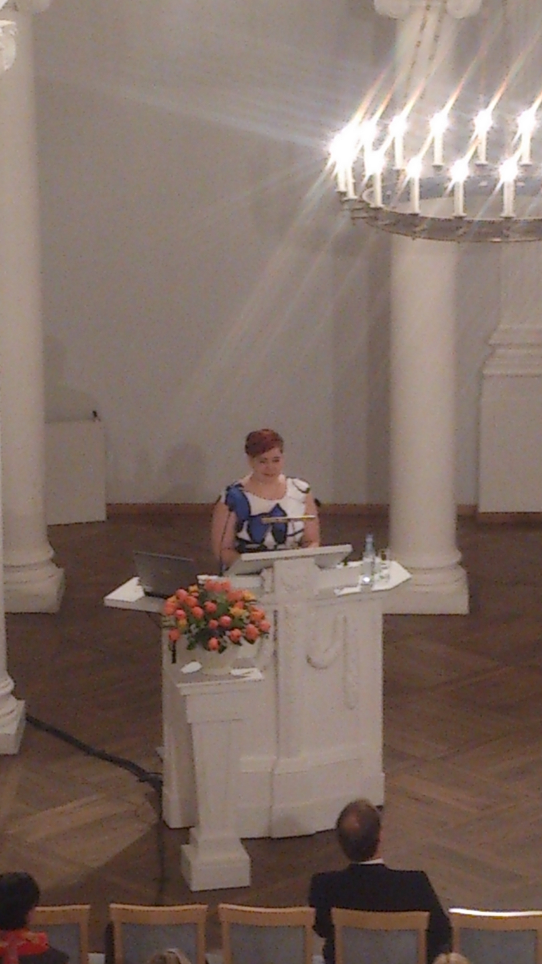 Pille Pruulmann-Vengerfeldti inauguratsiooniloeng Tartu Ülikooli aulas